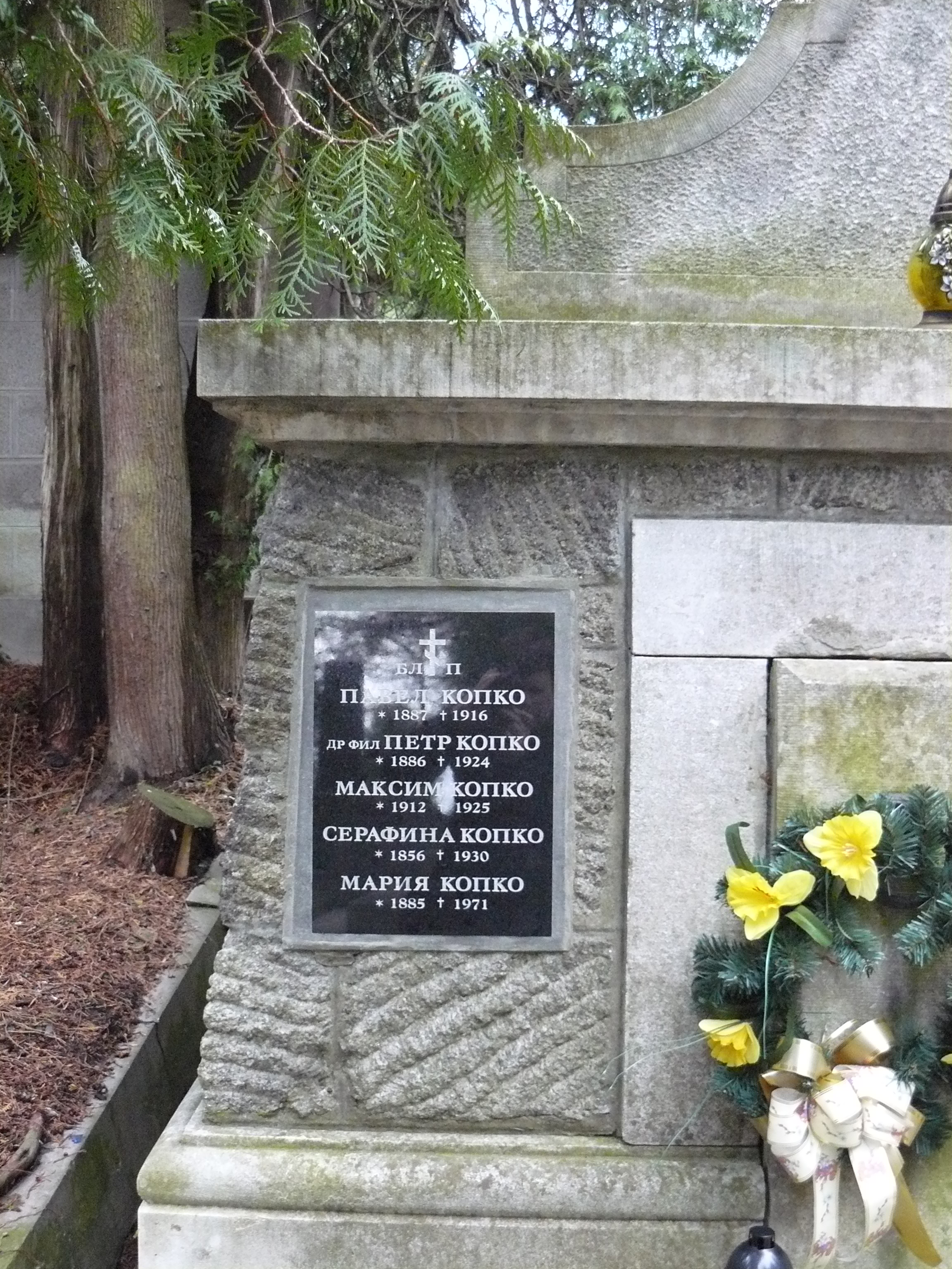 сімейна гробниця Копко у Перемишлі